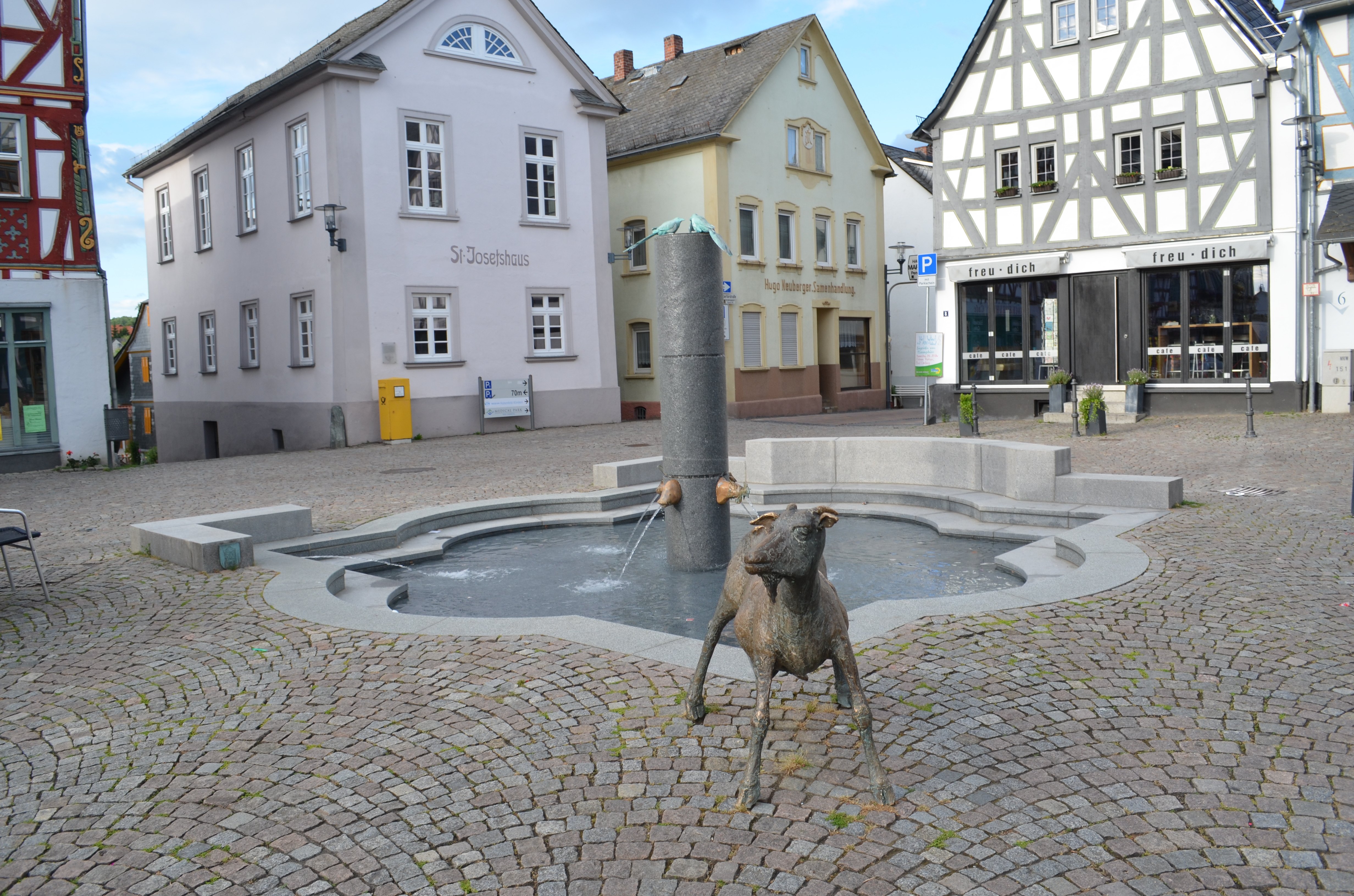 Bad Camberg, Marktplatz, Brunnen